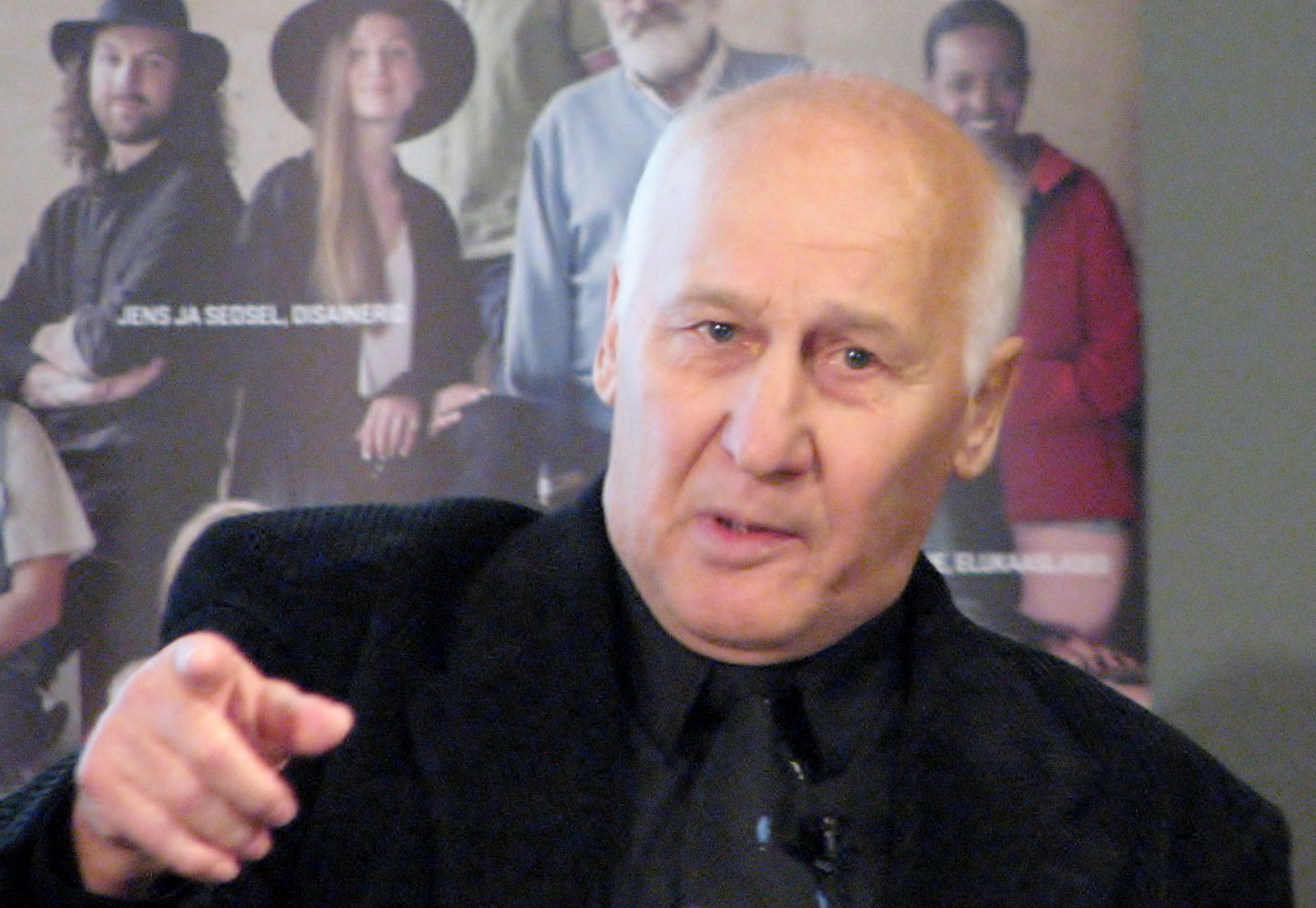 Roman Ubakivi Nordic Hotel Forumis toimunud Euroopa Parlamendi valimisdebatil „Kuidas tõmmata Euroopa majandus kraavist?“